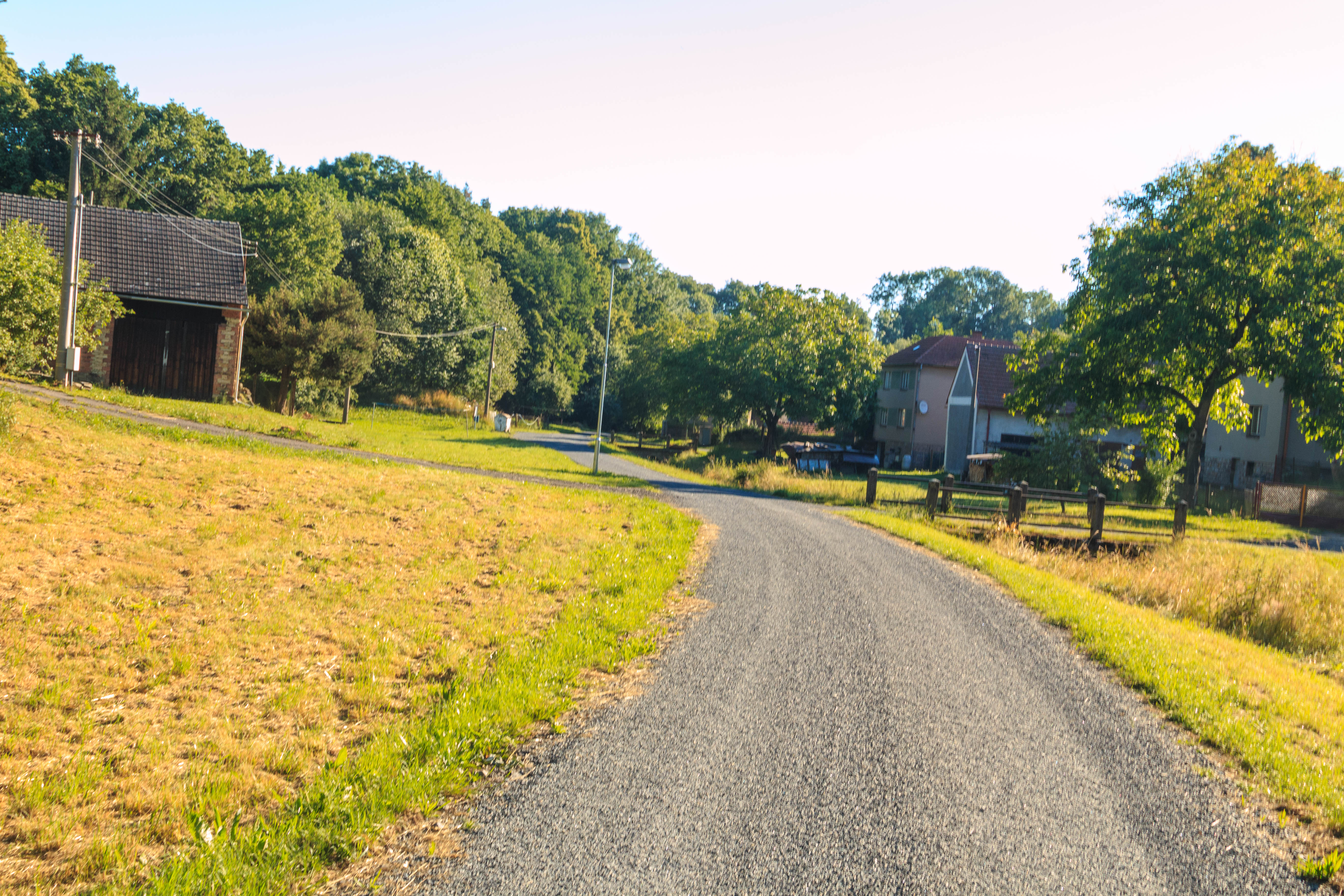 Vrtěšice čp. 16